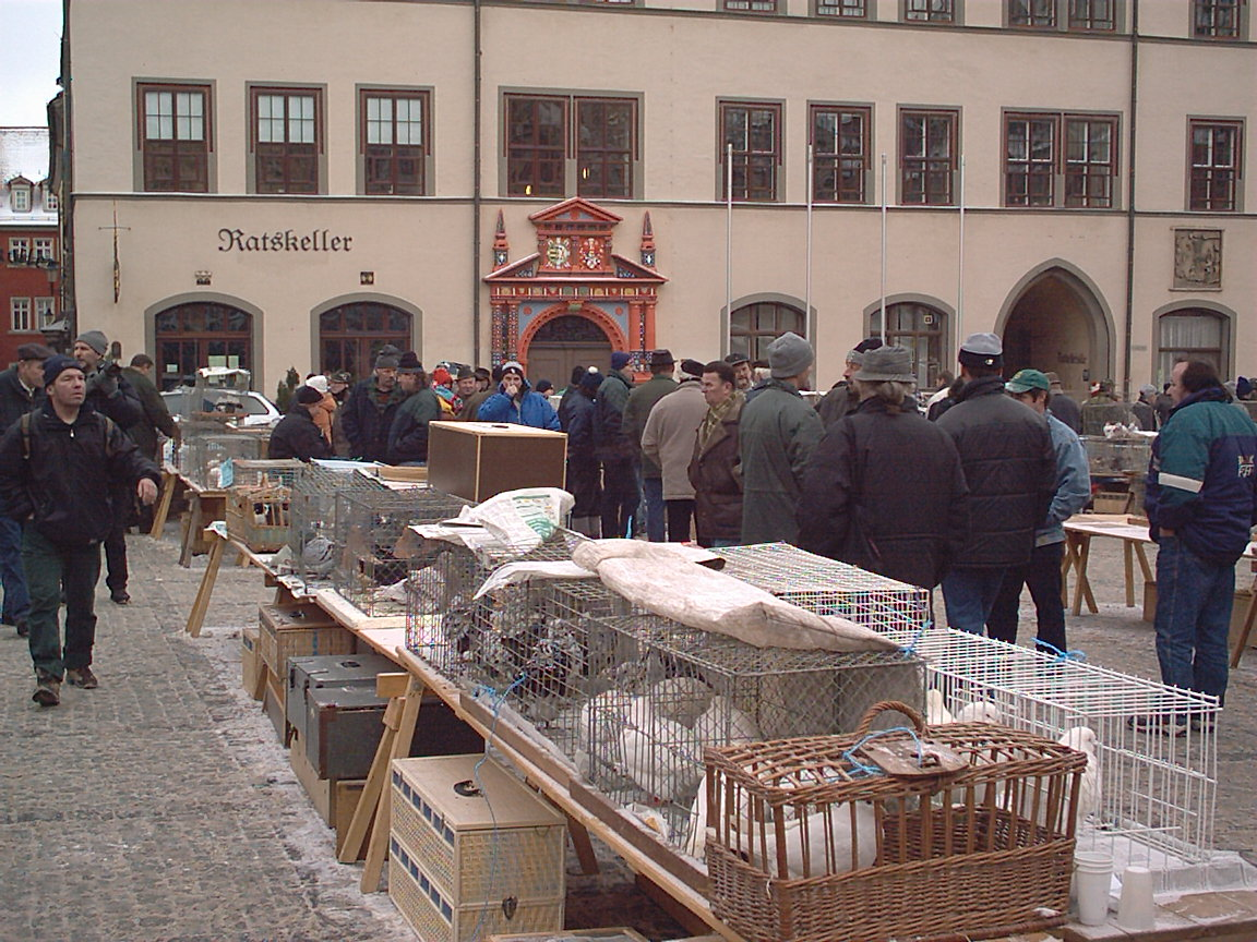 Ausschnitt aus dem Naumburger Taubenmarkt